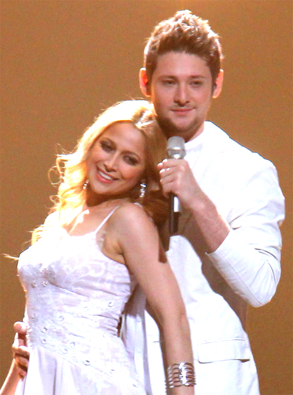 Gewinner des ESC 2011 Aserbaidschan